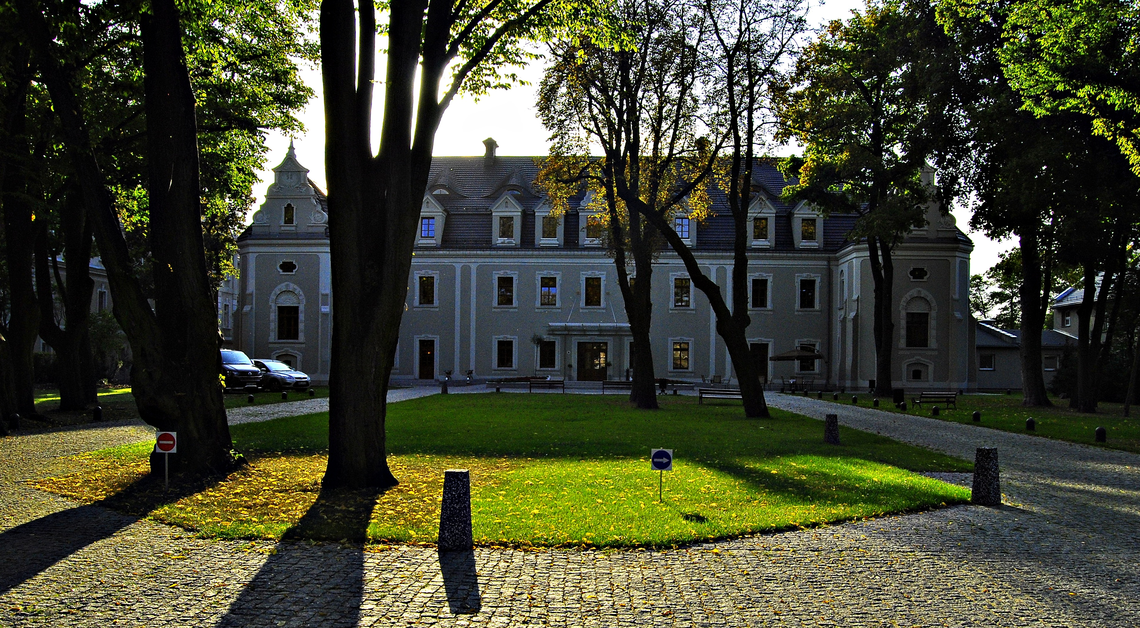 Hotel Zamek Lubliniec 03.1978.